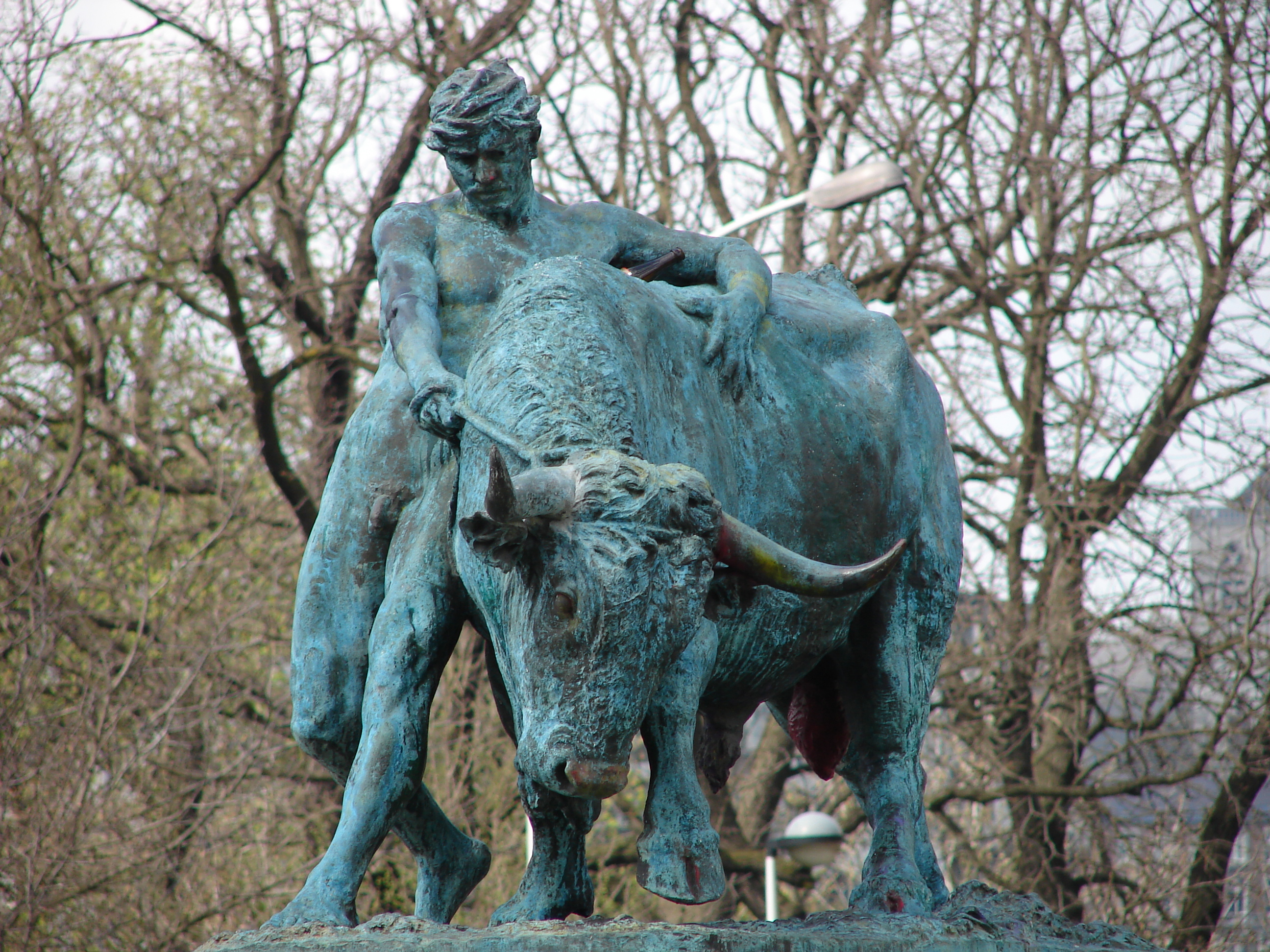 Le taureau de Liège photographié par mes soins le 18 avril 2006. Min's - 愛 19 avril 2006 à 10:39 (CEST)